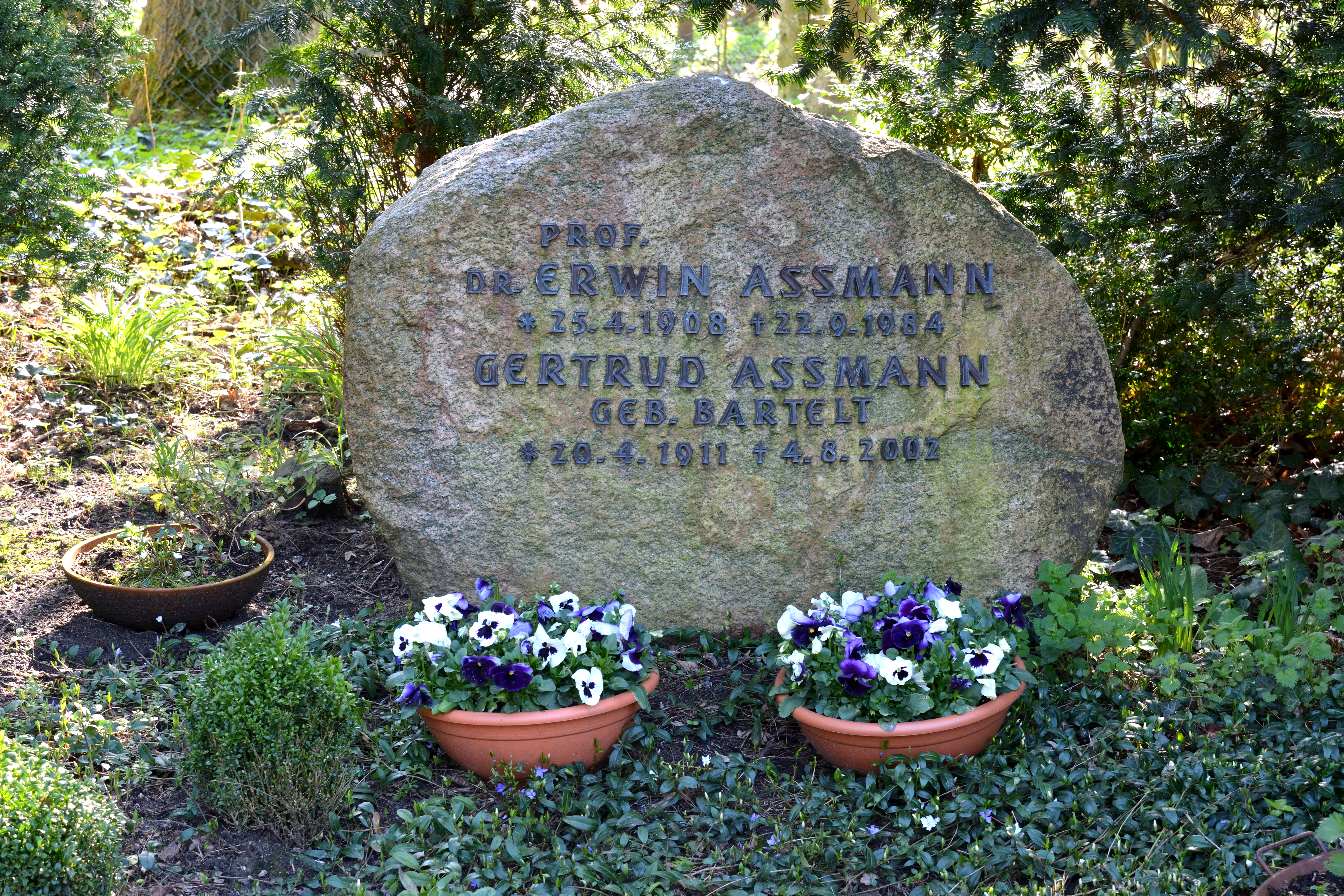 Impressionen vom Nordfriedhof in Kiel: Grab von Erwin Assmann